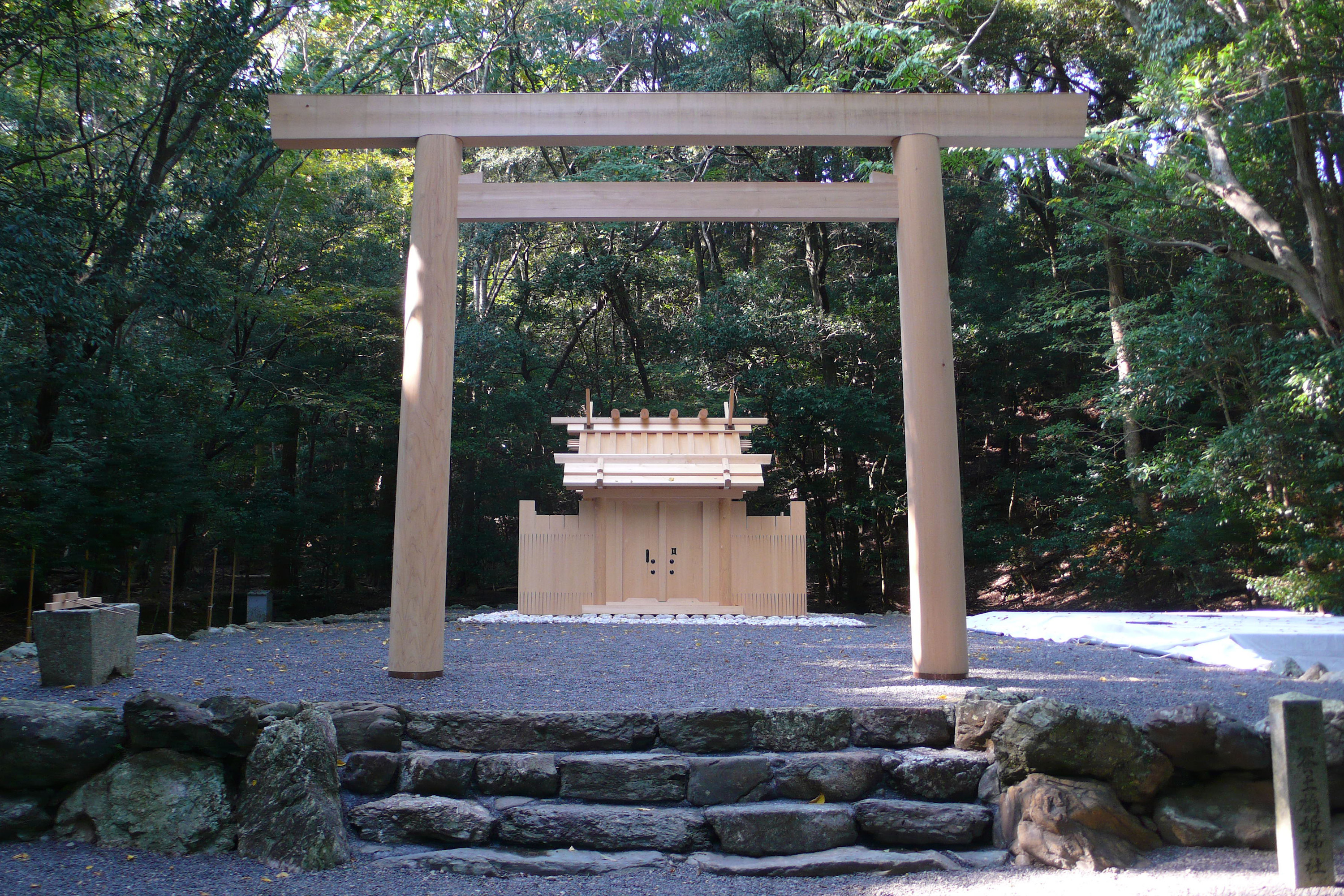 三重県伊勢市宇治今在家町にある皇大神宮（内宮）所管社の饗土橋姫神社（あえどはしひめじんじゃ）。